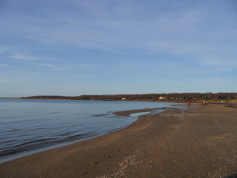 kattegat bay, take from halmstad, Sweden.